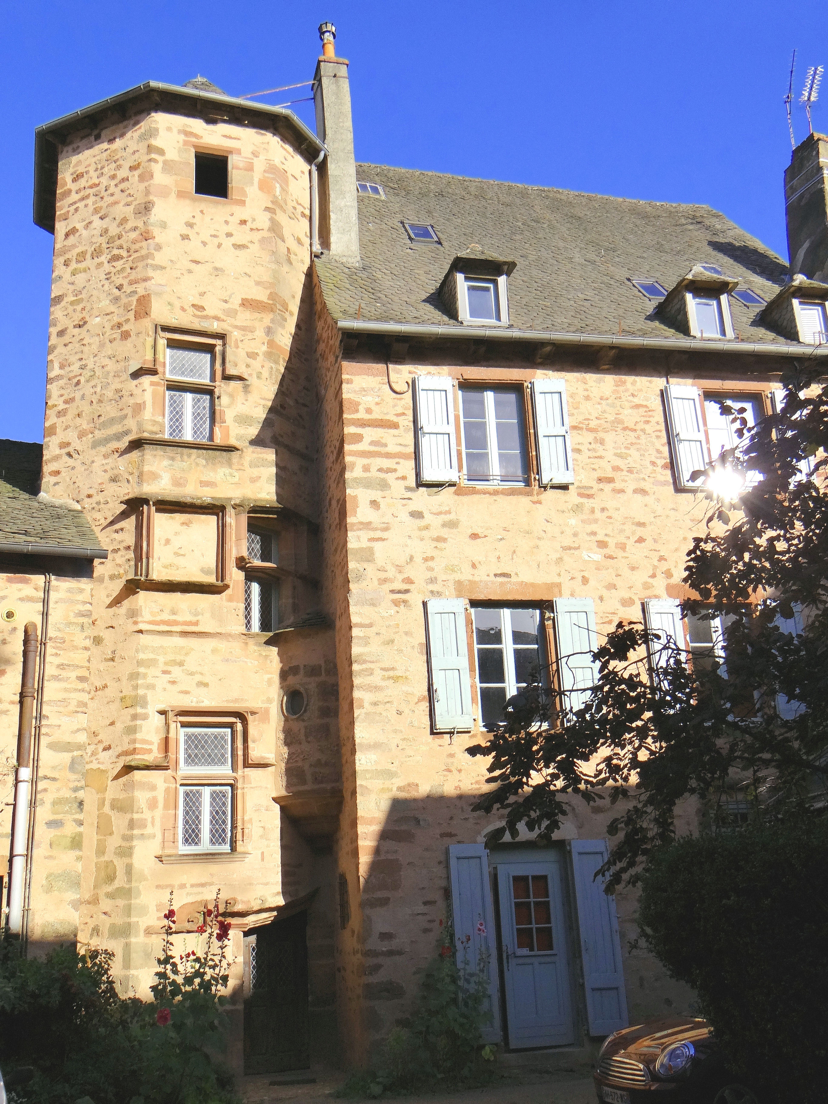 Rodez - Hôtel de Bonald - Escalier à vis et cour intérieure donnant sur la rue Séguy